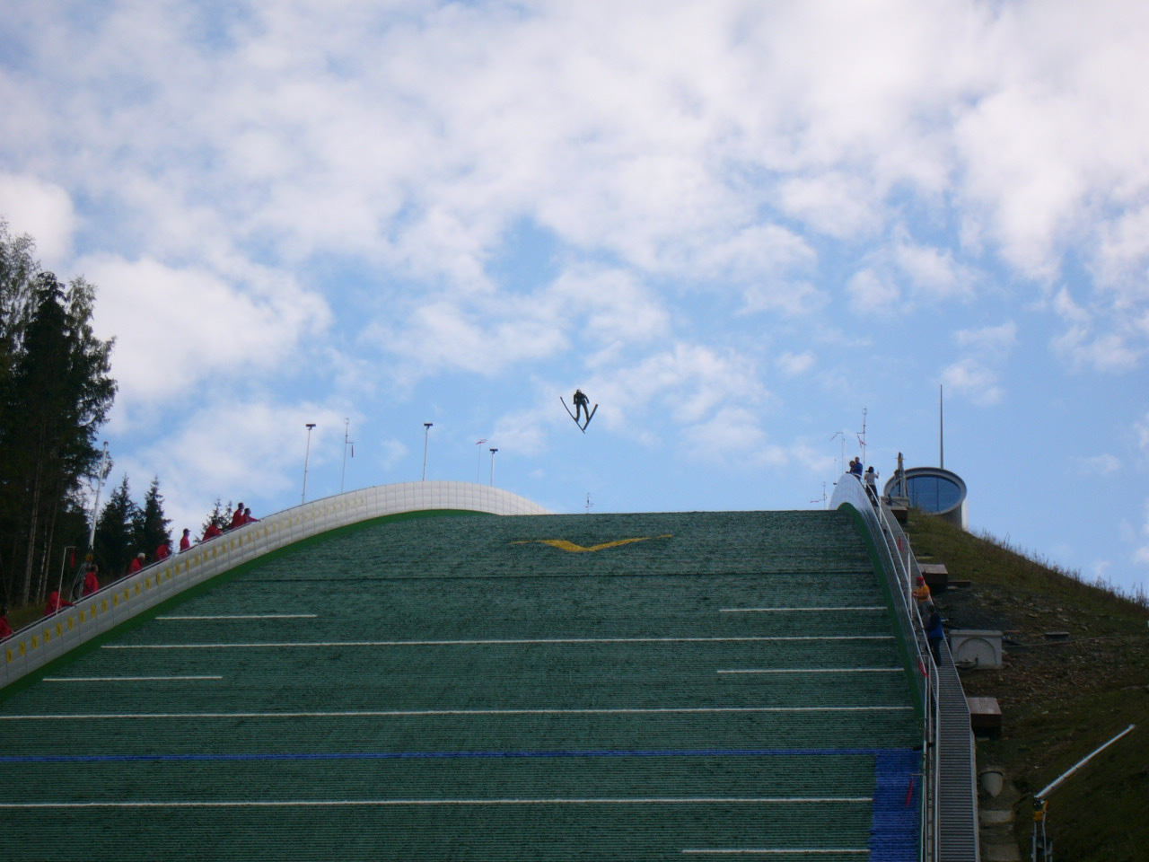 Sommer-Grand Prix in der Vogtlandarena am Schwarzberg in Klingenthal/Sa. 2007